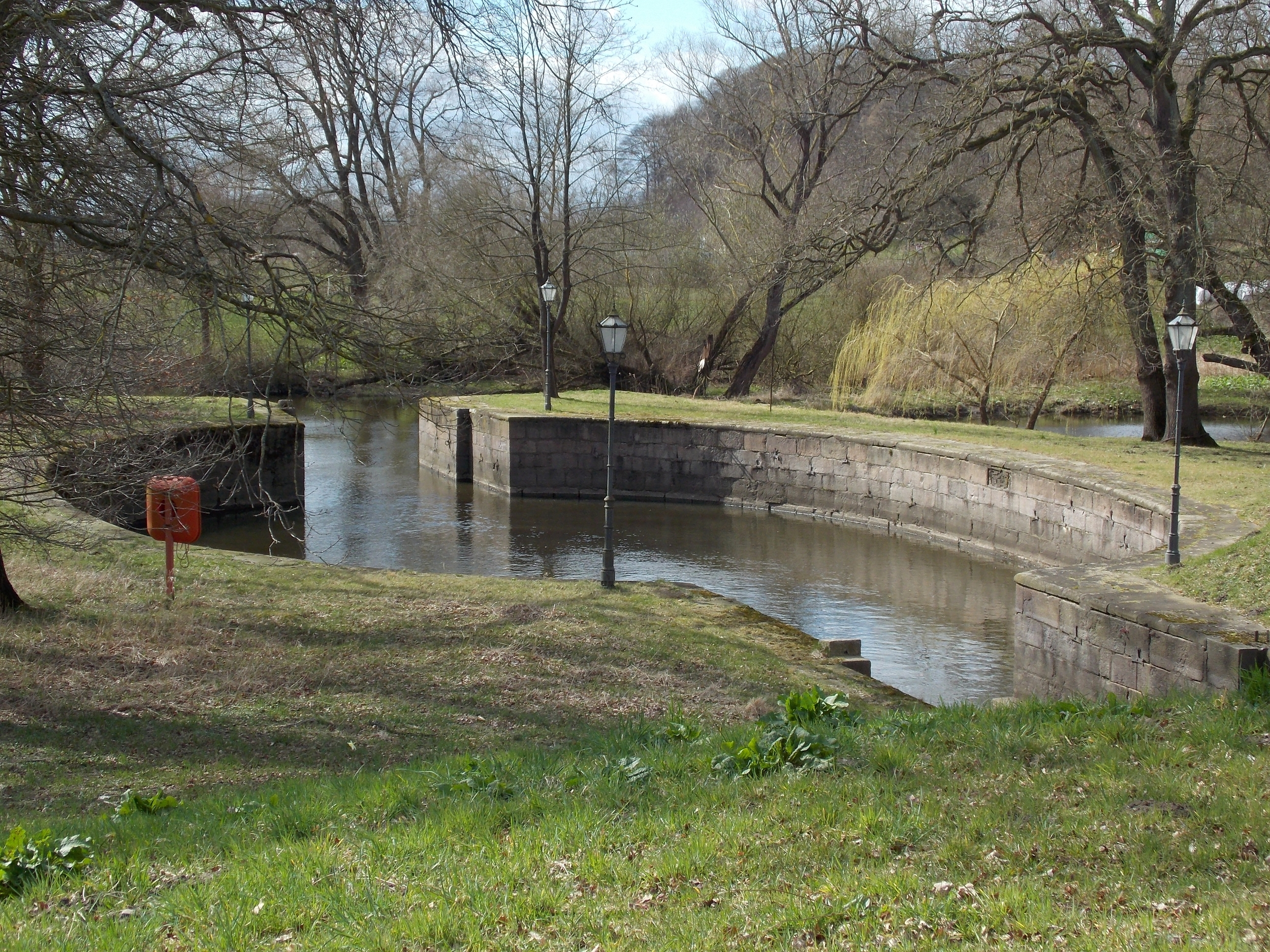 Palmschleuse Lauenburg, April 2015